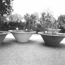 Bundesgartenschau 1957 in Köln - Wasserpflanzenbecken